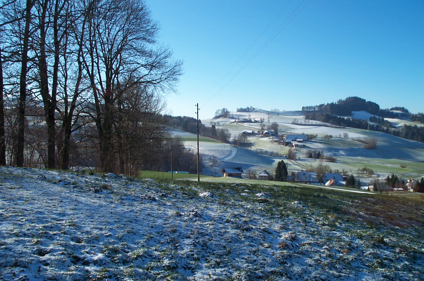 Zimmerwald Obermuhlern Brönni Bezirk